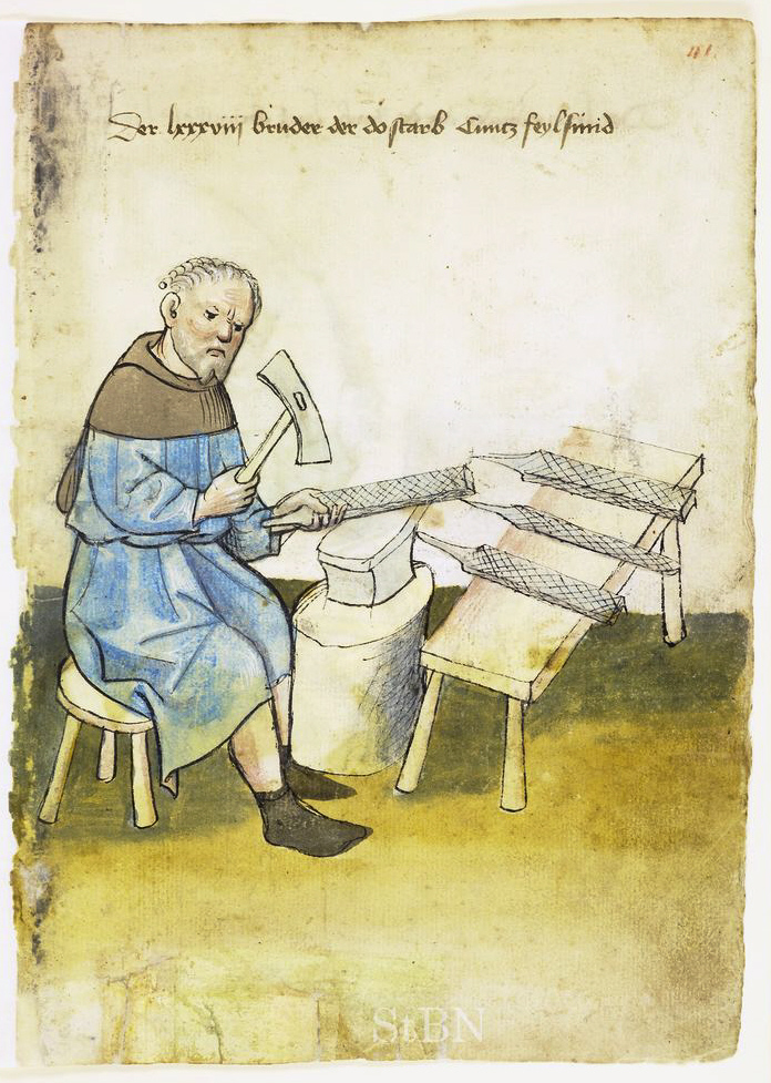 Cuntz (Kunz) feylsmid (Feilschmied) , feylsmid (Feilenschmied; Feilenhauer) Transkription und weitere Informationen